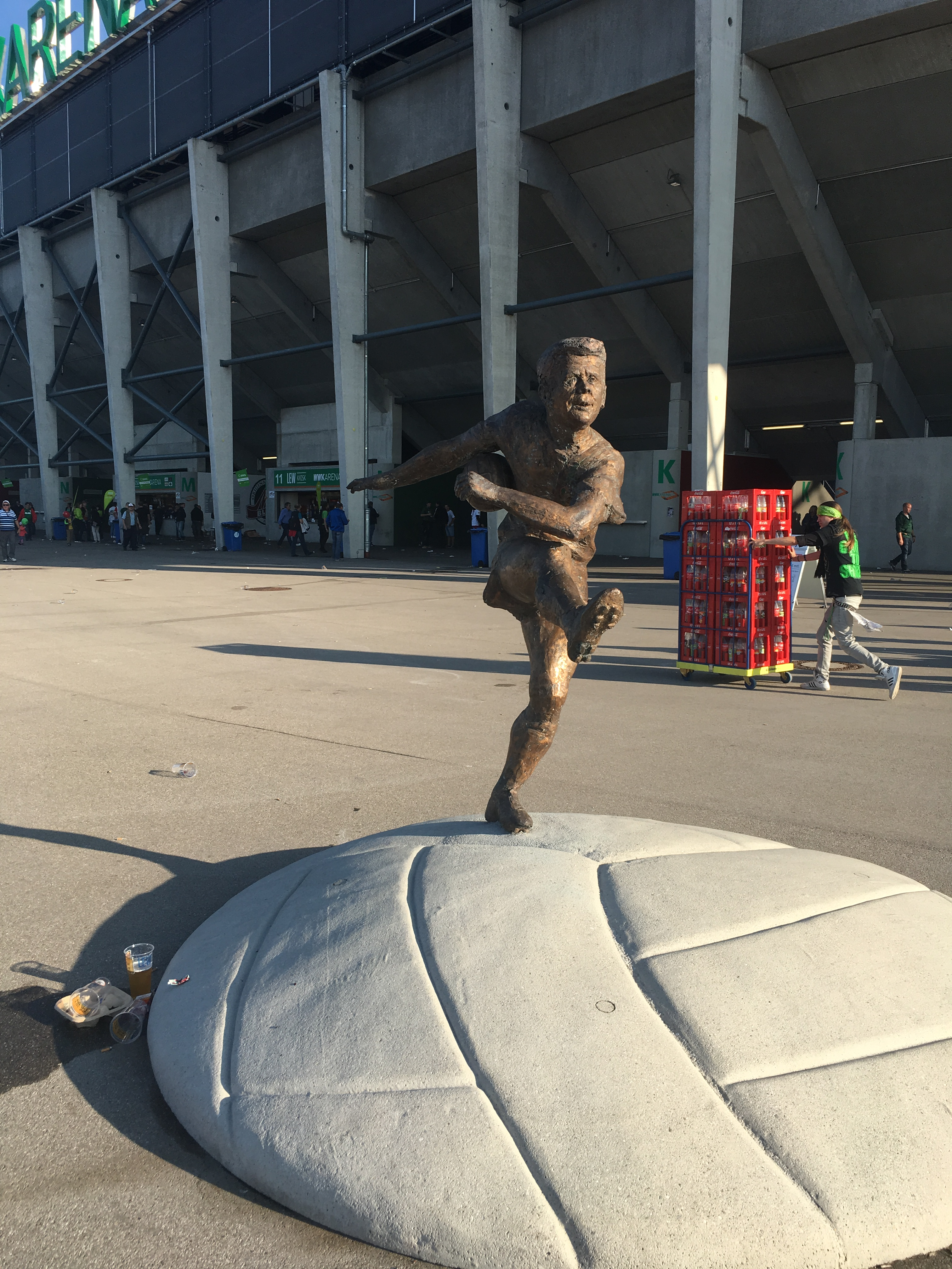 Helmut-Haller-Denkmal vor der WWK-Arena